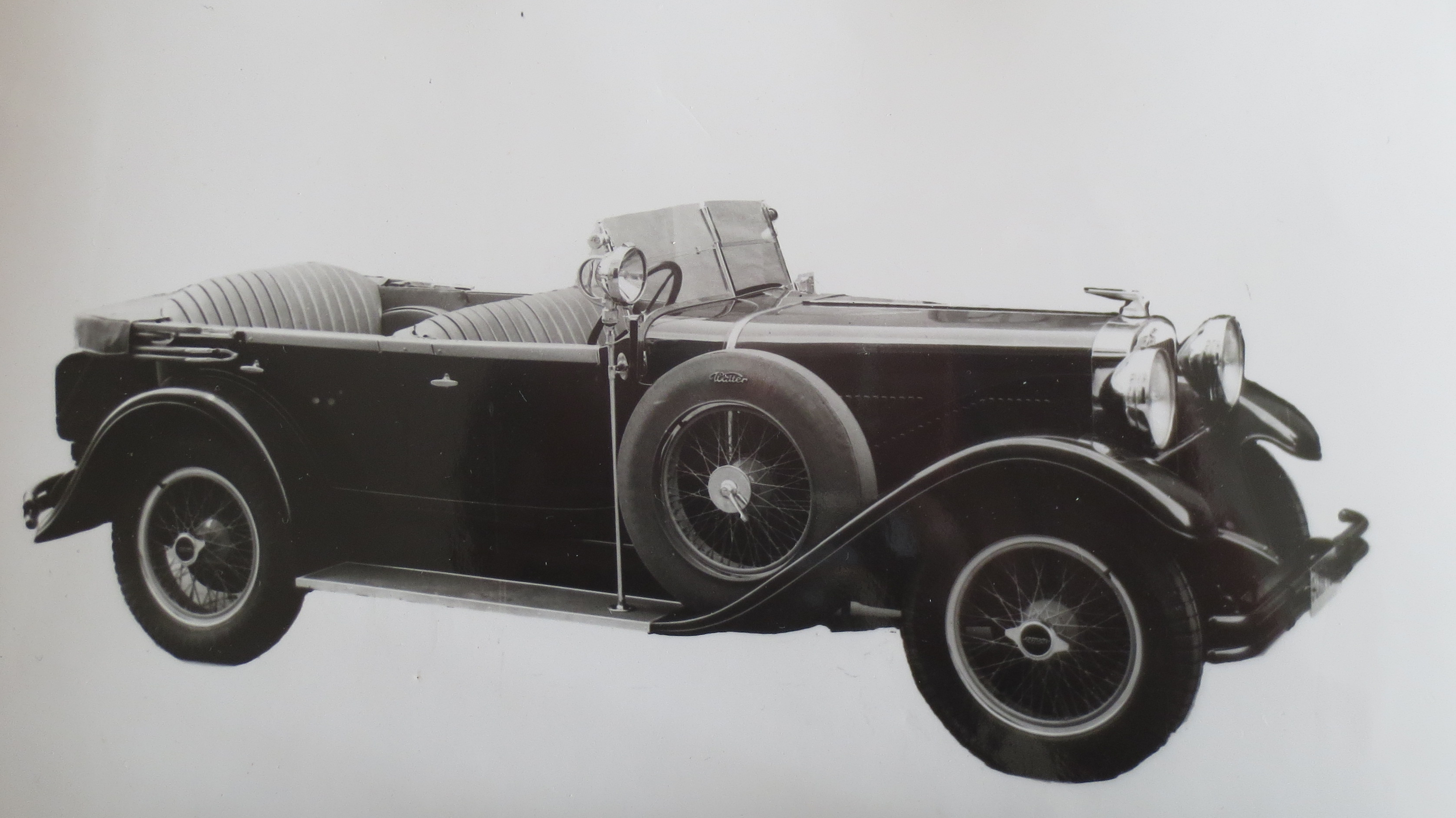 Walter Super 6 (1931) faeton